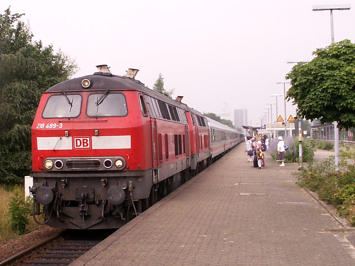 Marschbahn